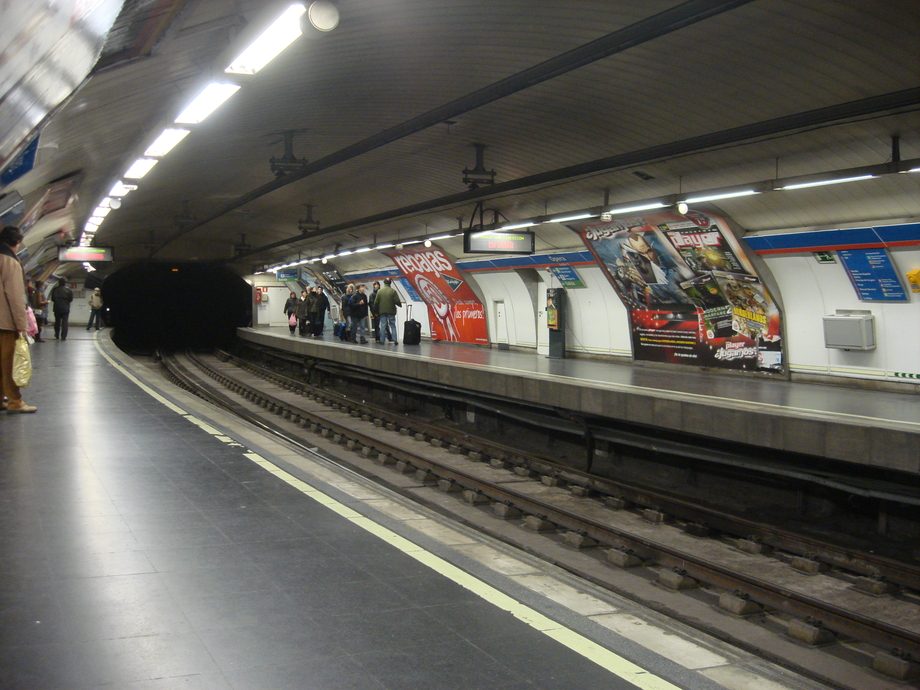 Andén de la línea 2 de la Estación de Ópera del Metro de Madrid.